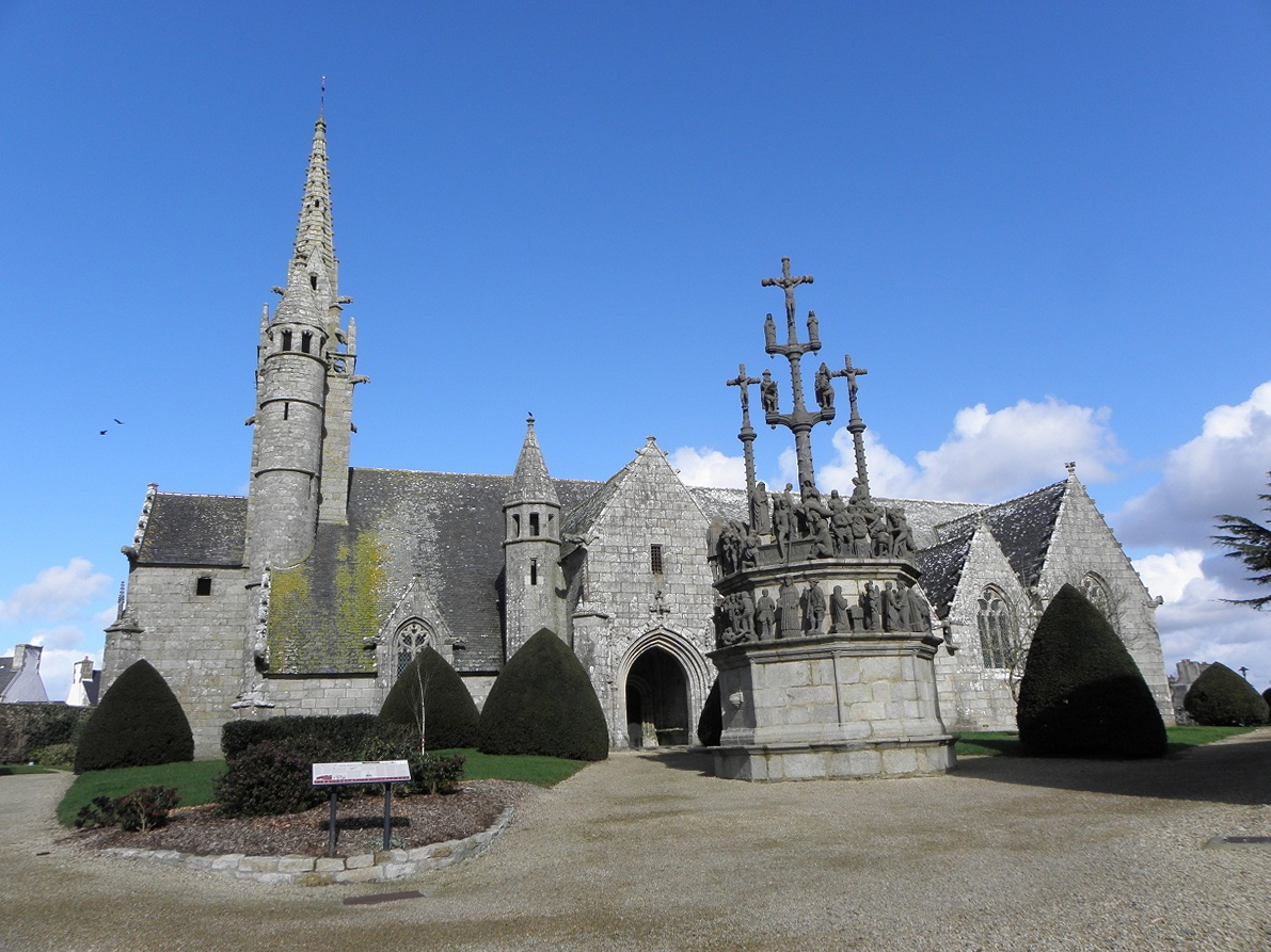 Calvaire et église de l'enclos paroissiale de Plougonven (29).